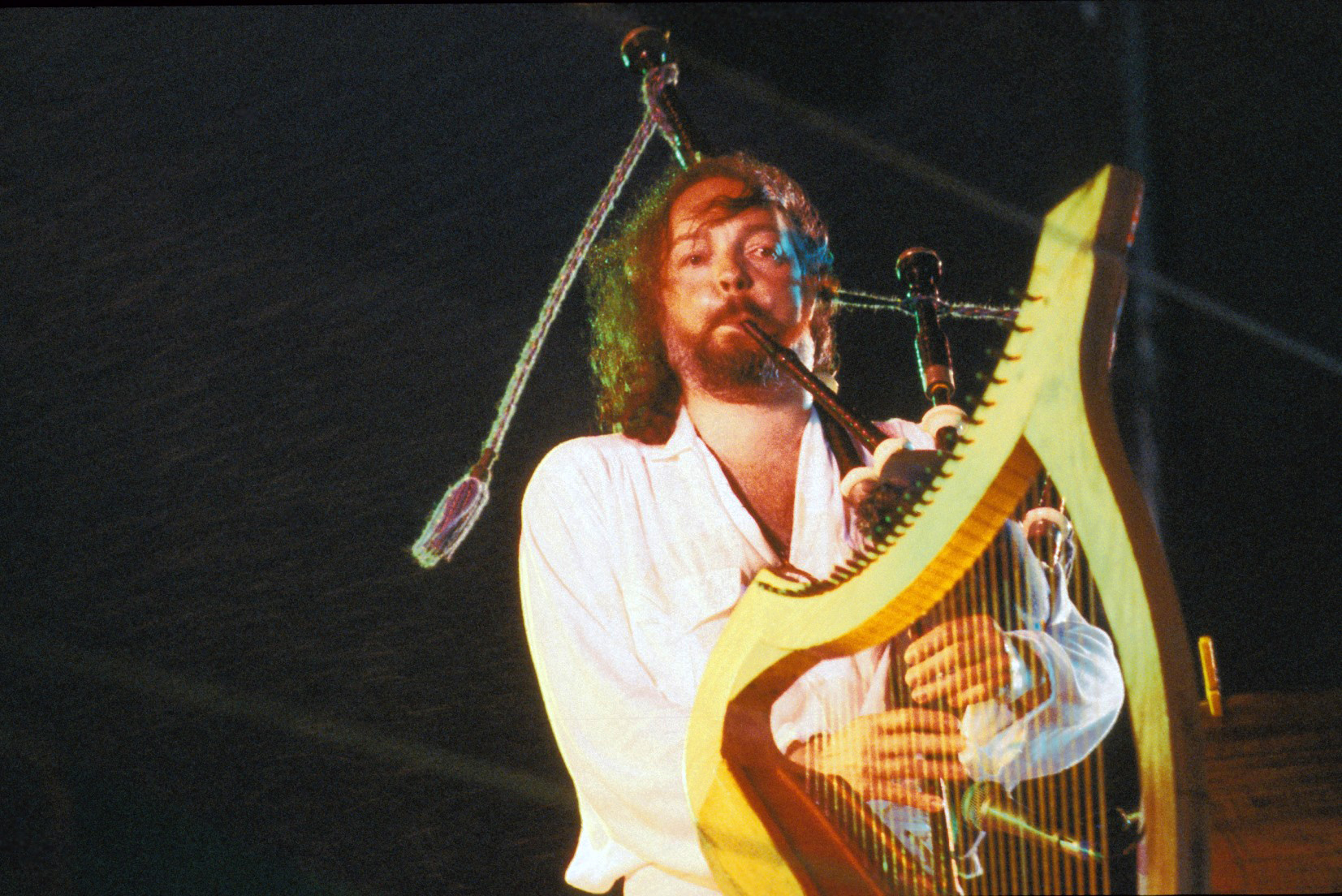 Première représentation de la Symphonie Celtique d'Alan Stivell au Stade du Moustoir à Lorient le dimanche 3 août 1980.